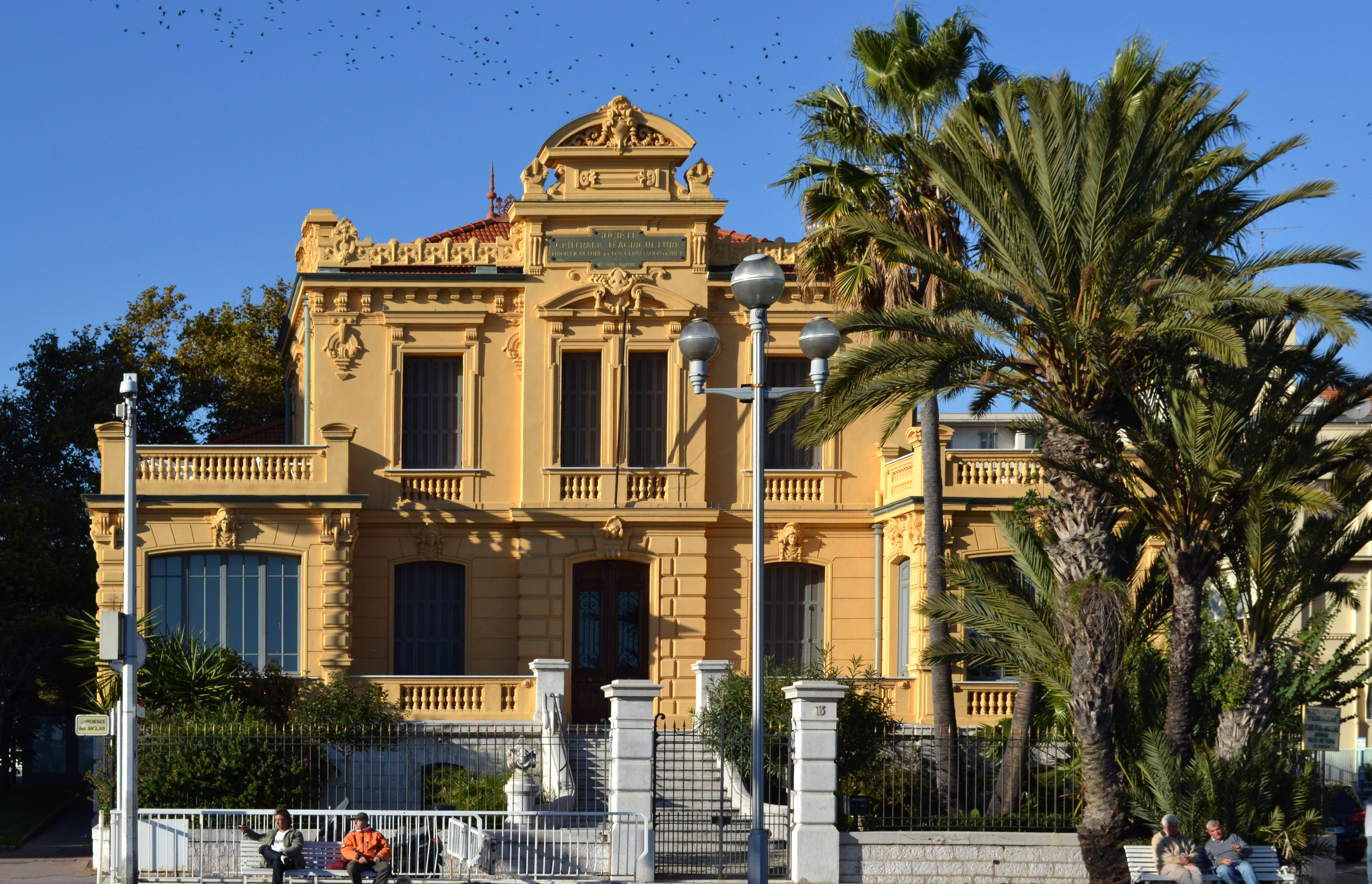 Palais de l'agriculture (Nice, France)